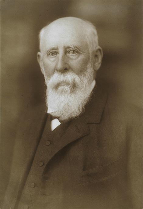 Porträtfotografie von Julius Kollmann